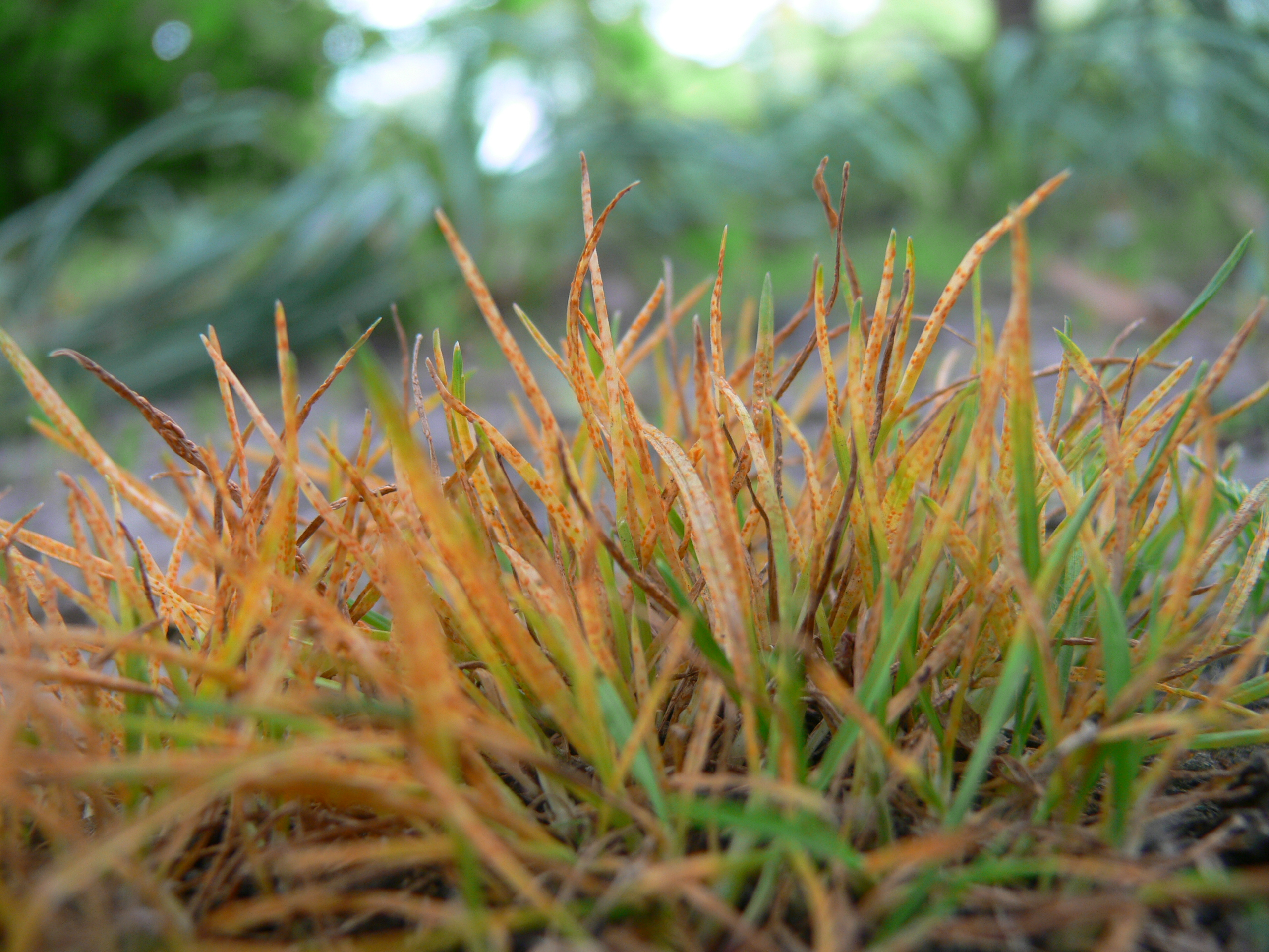 Descente de cîme, mais aussi exemple de résilience écologique. Poa pratensis with rust (Puccinia poae-nemoralis)